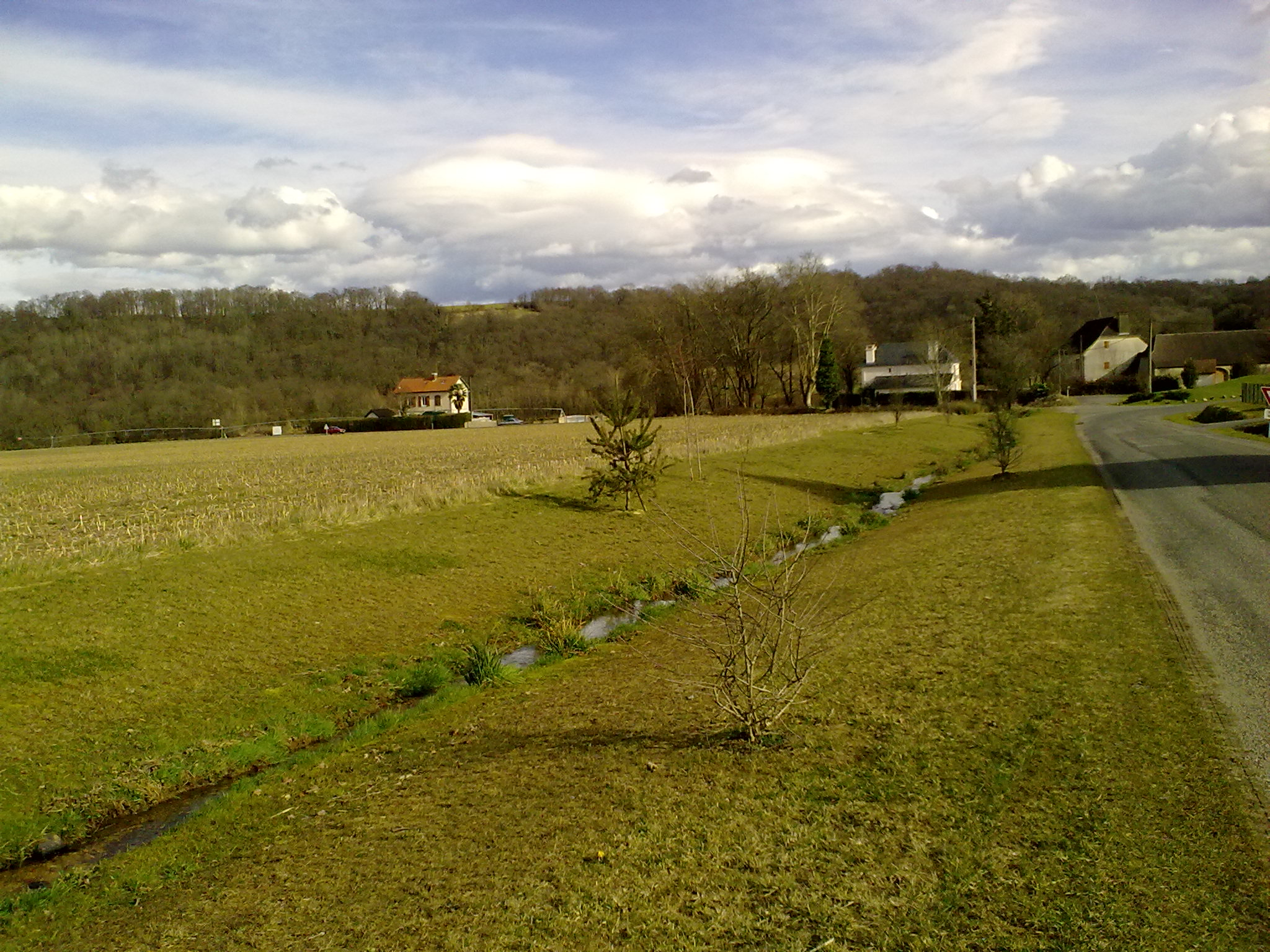 Paysage depuis Monassut-Audiracq